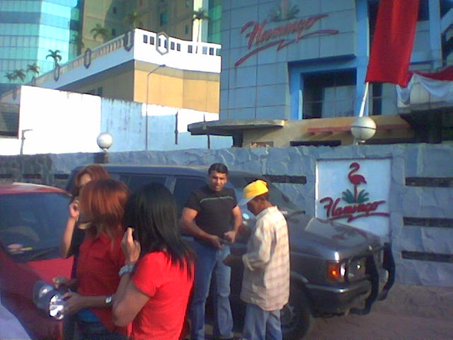 Model gedung Flamingo sebelum berubah menjadi restoran Wakul Nasi Flamingo.